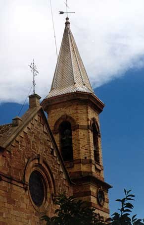 Vista de la Iglesia de Marmolejo